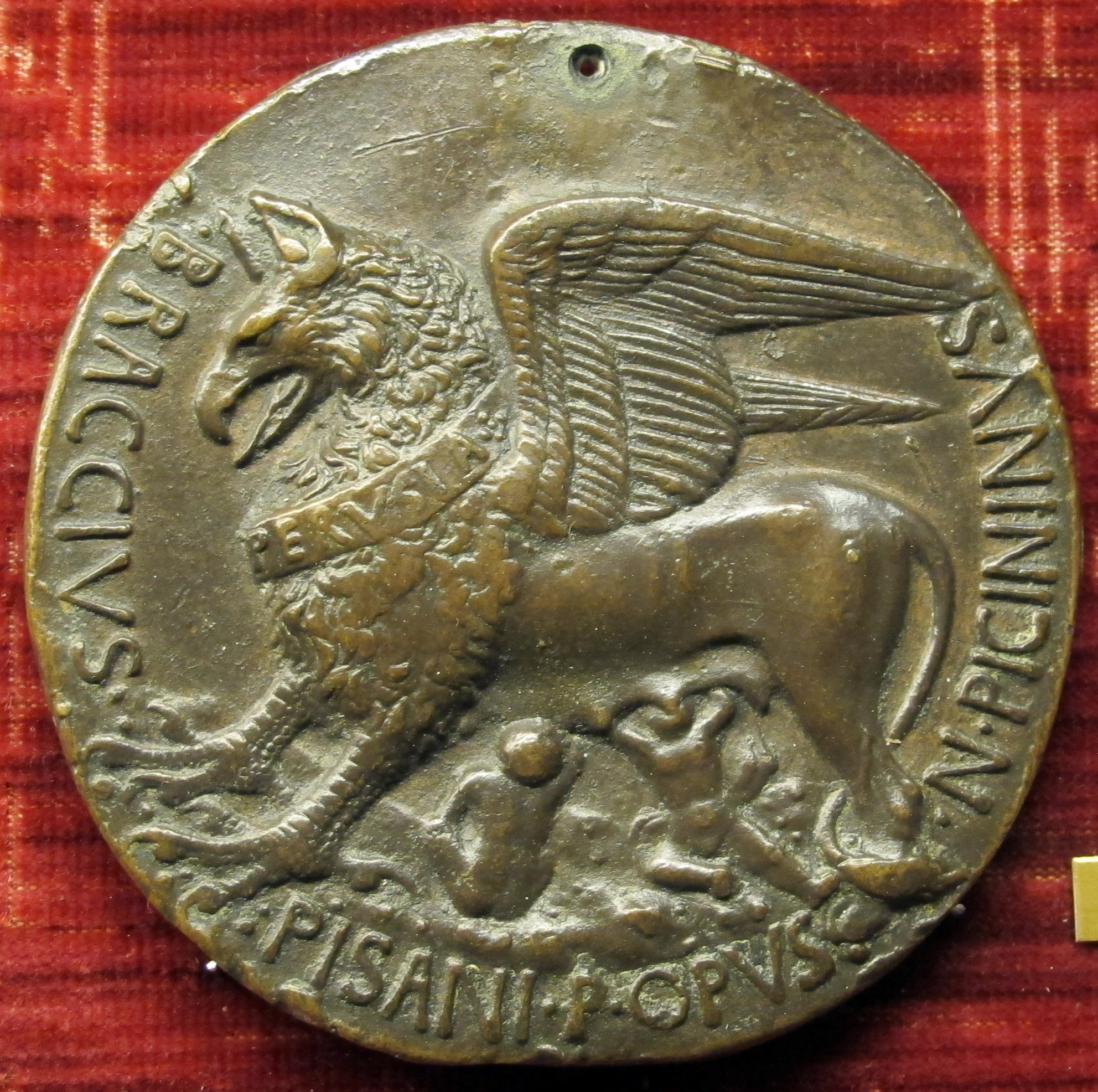 Pisanello, medaglia di niccolò piccinino, verso con grifone di perugia